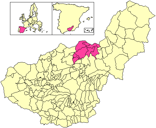 Situación de la Mancomunidad del Mencal respecto a la provincia de Granada, en España.